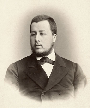 Николай Александрович Алексеев